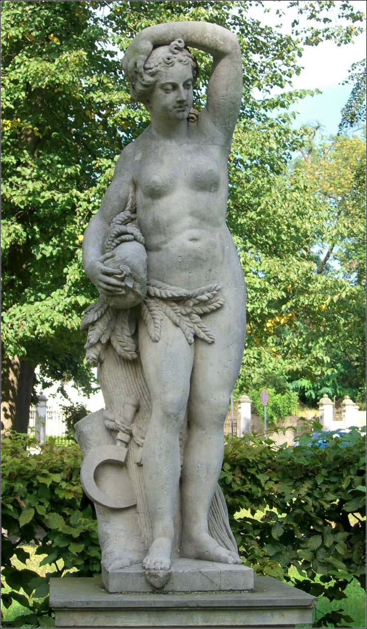 Ceres in der Götterallee Neustrelitz